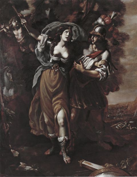 Tancredo y Armida